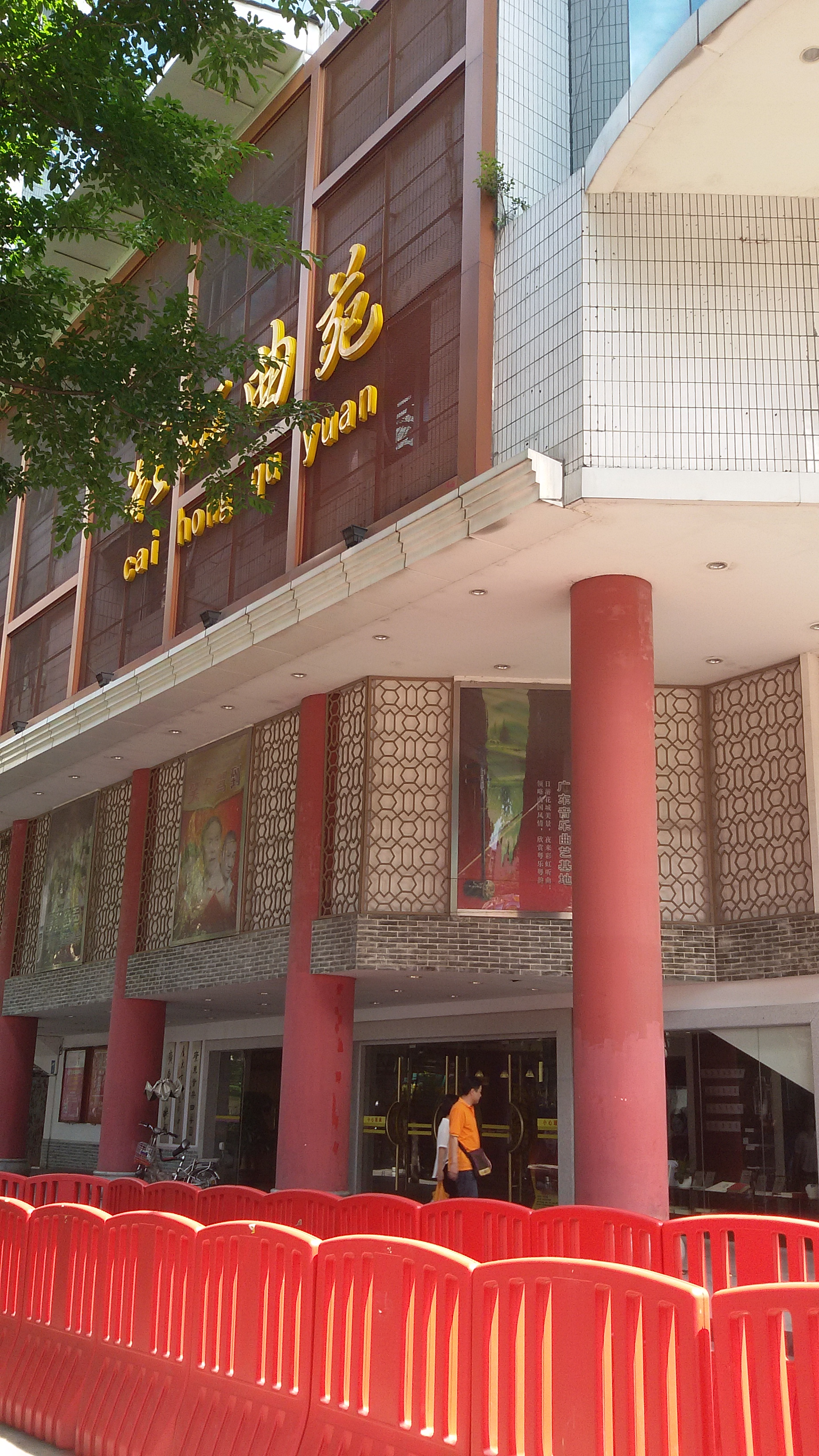 粵語: 彩虹曲苑（原彩虹影劇院）